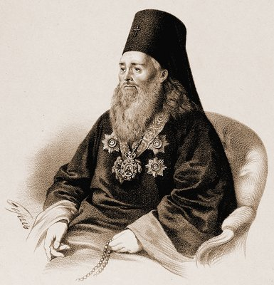 Евгений (Баженов), архиеп. Псковский и Порховский. Литография П. Ф. Бореля. Нач. 60-х гг. XIX в. (ГИМ)